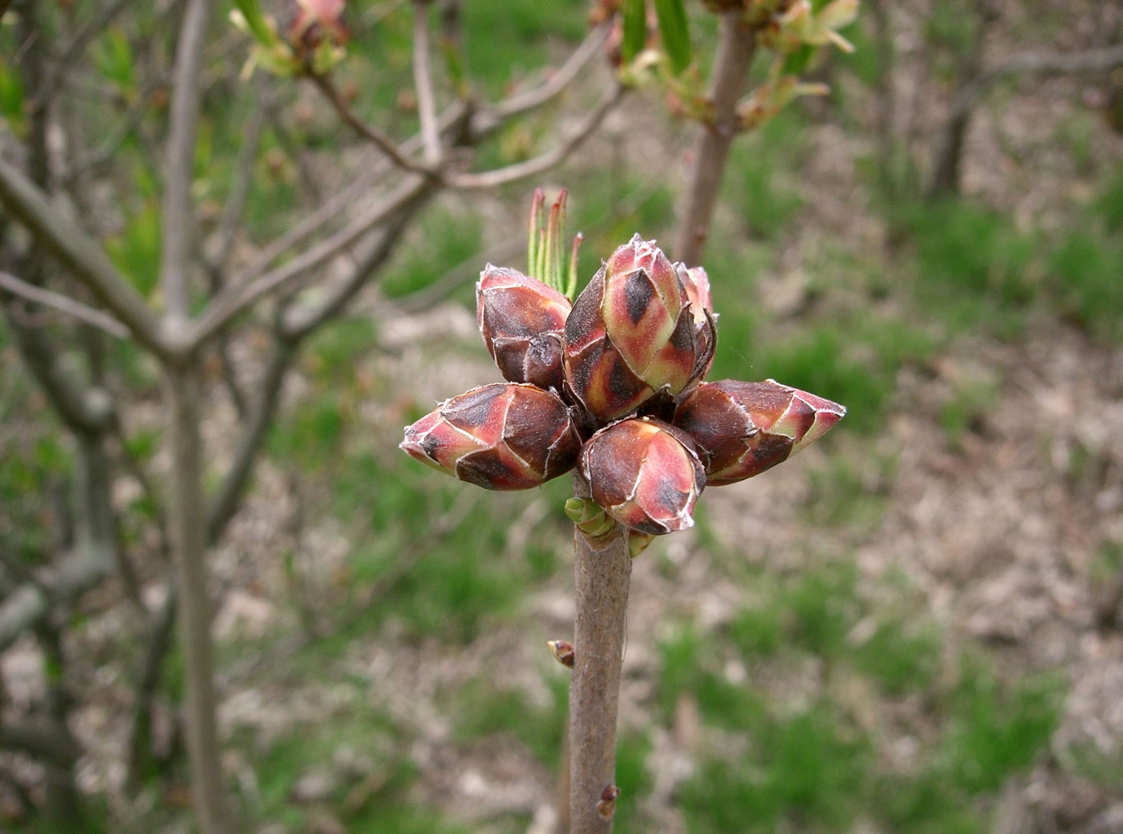 Rhododendron japonicum